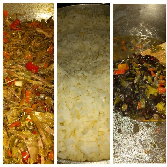 Sabroso :)